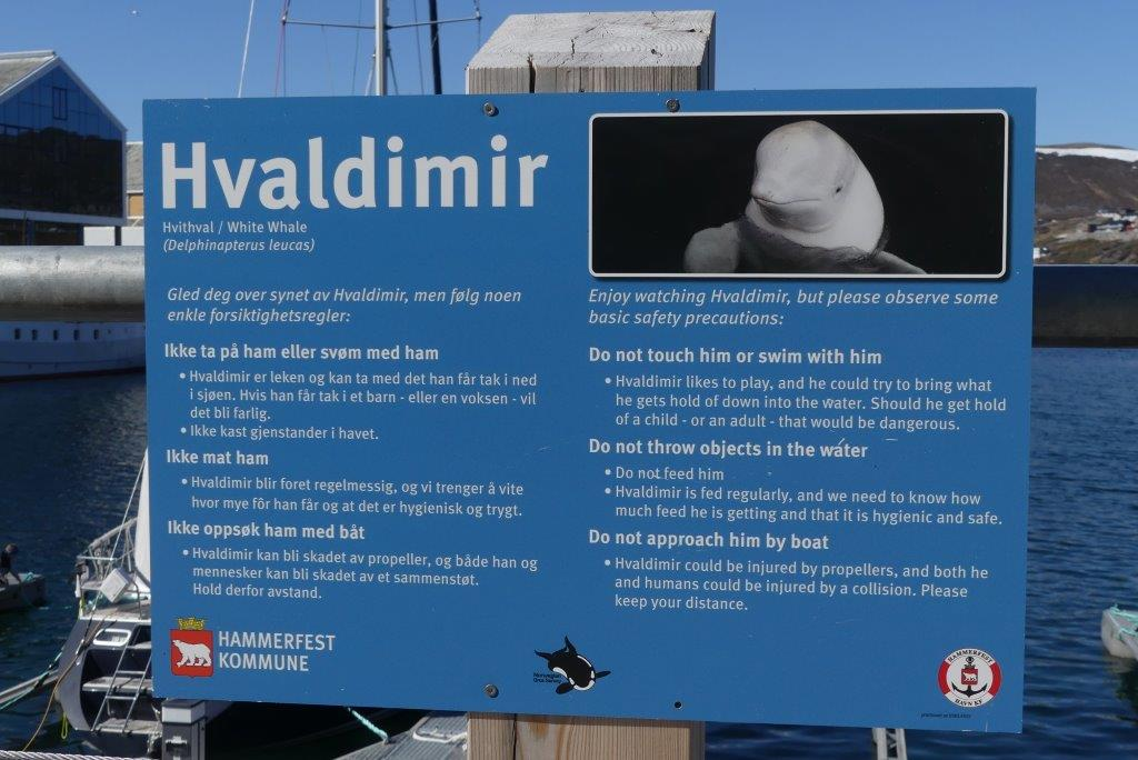 Hvaldimir skilt